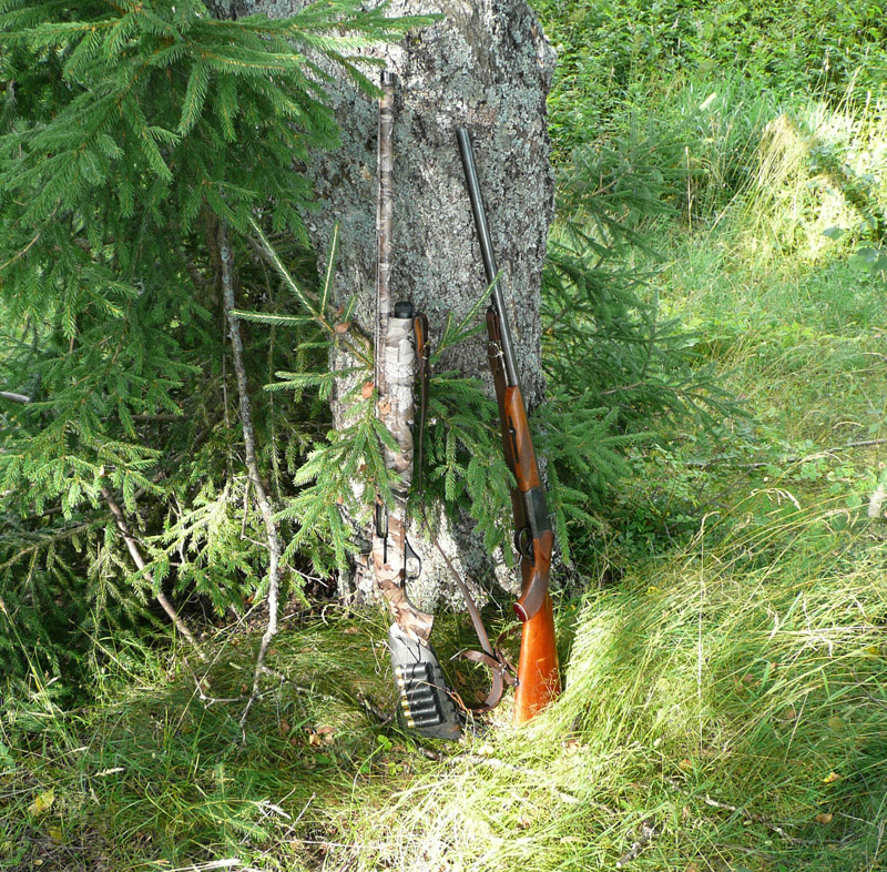 МП-153 и проверенное временем ИЖ-18